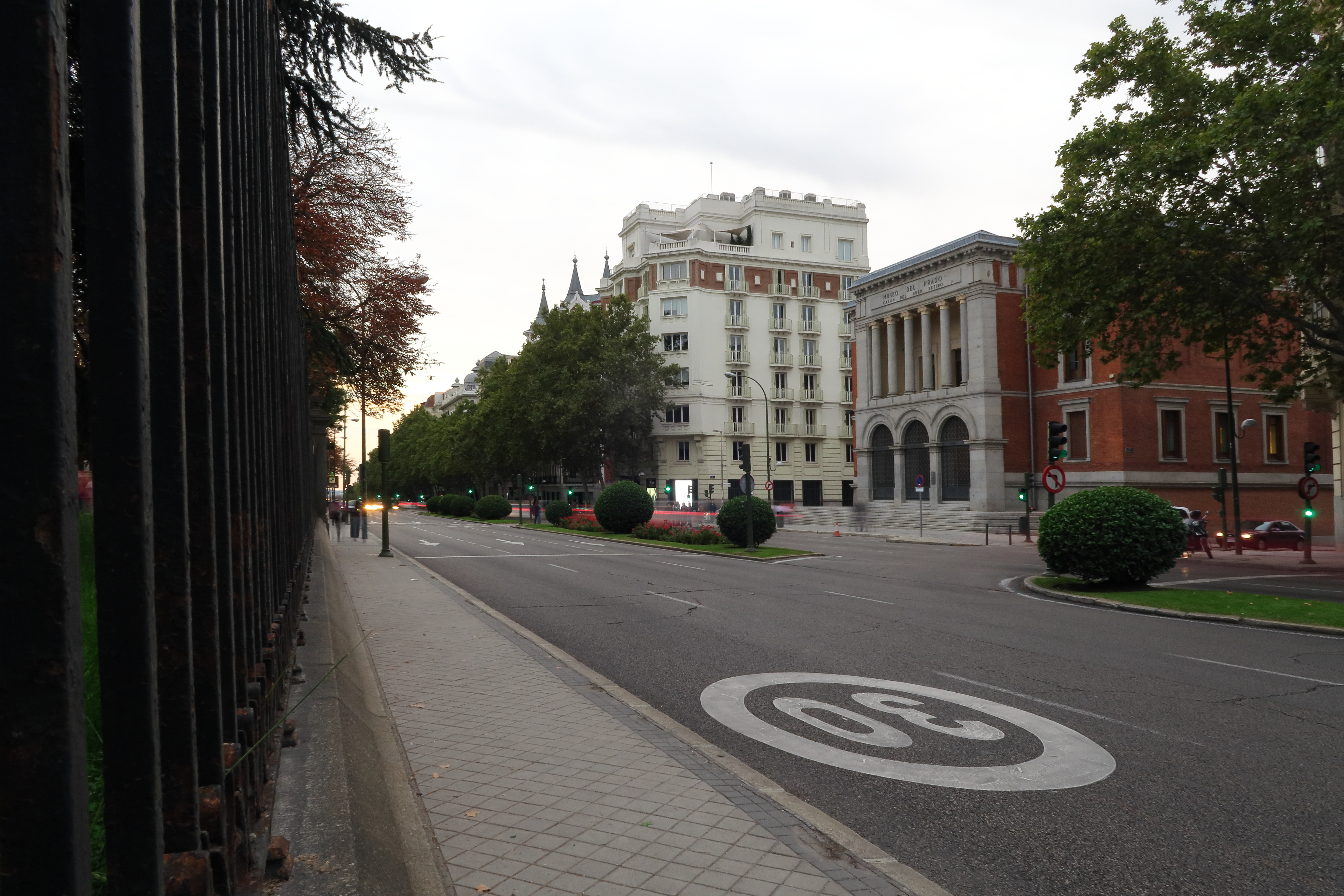 Calle Alfonso XII, desde confluencia con calle Felipe IV, sur